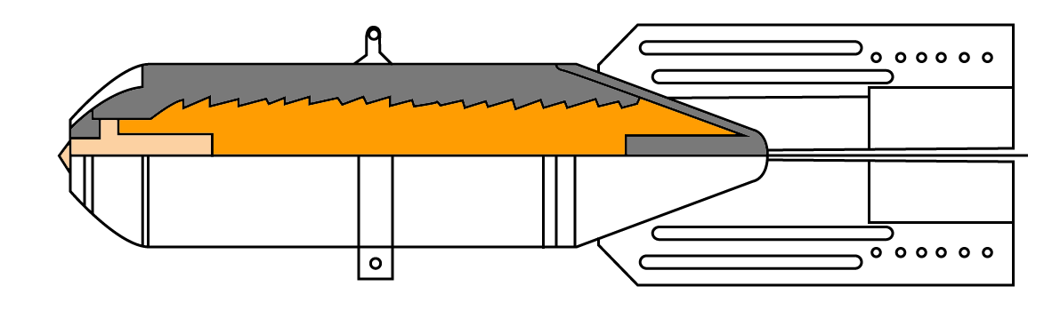 ОФАБ